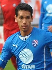 Рубен Гомес — аргентинський футболіст